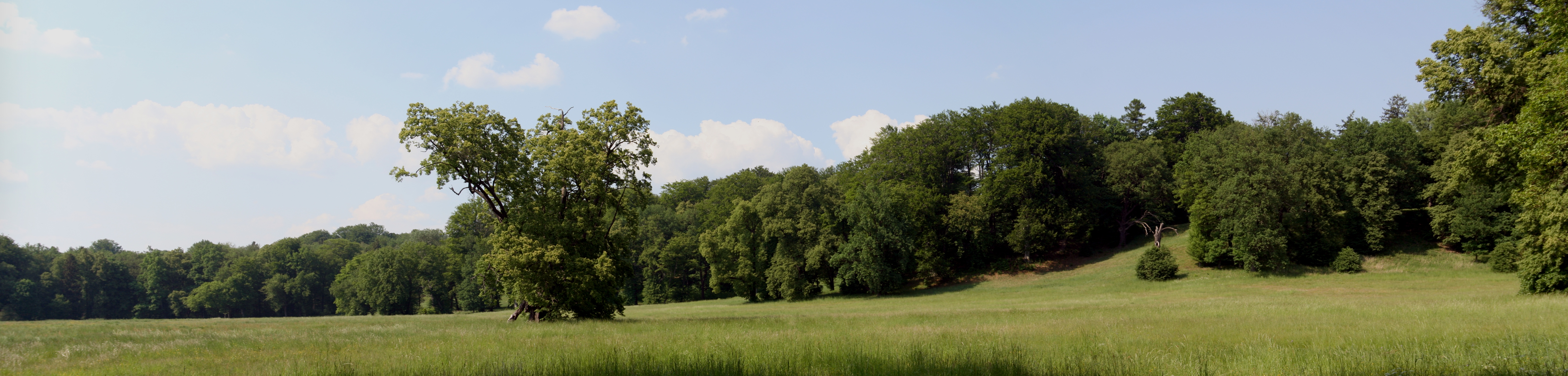 Park Mużakowski, polana stanowiąca część osi widokowej na Nowy Zamek